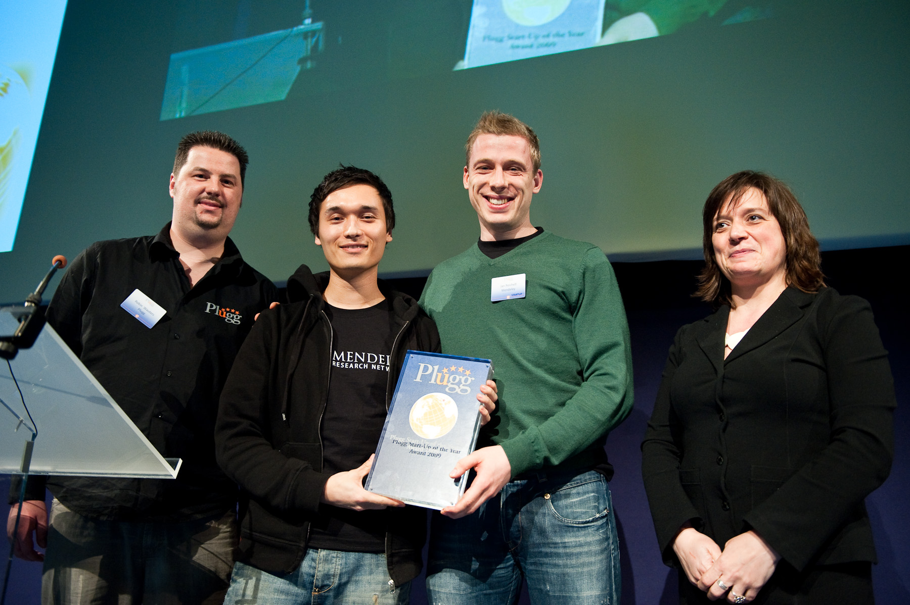 Plugg 2009